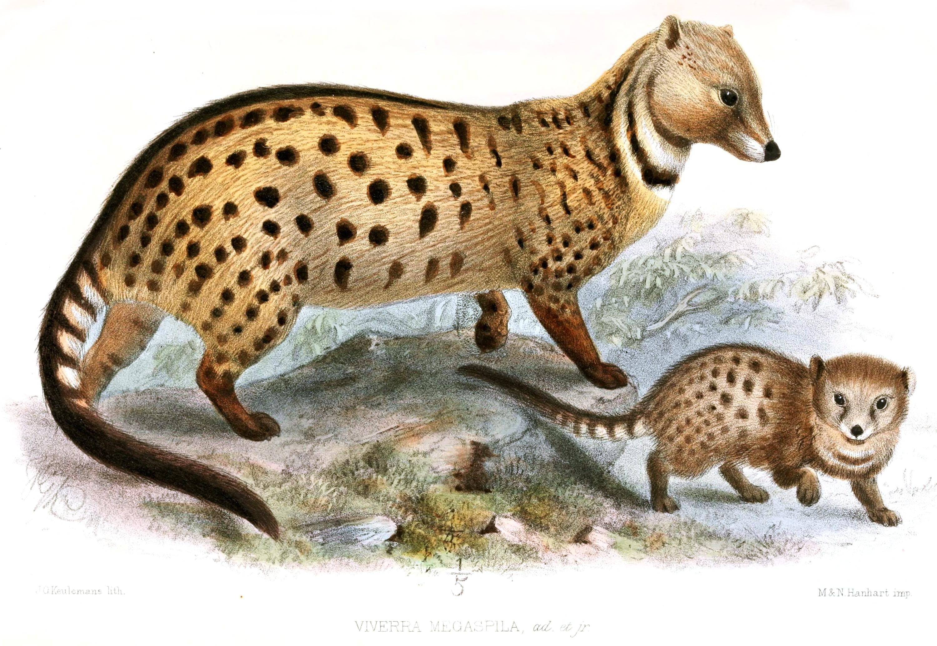 Viverra megaspila